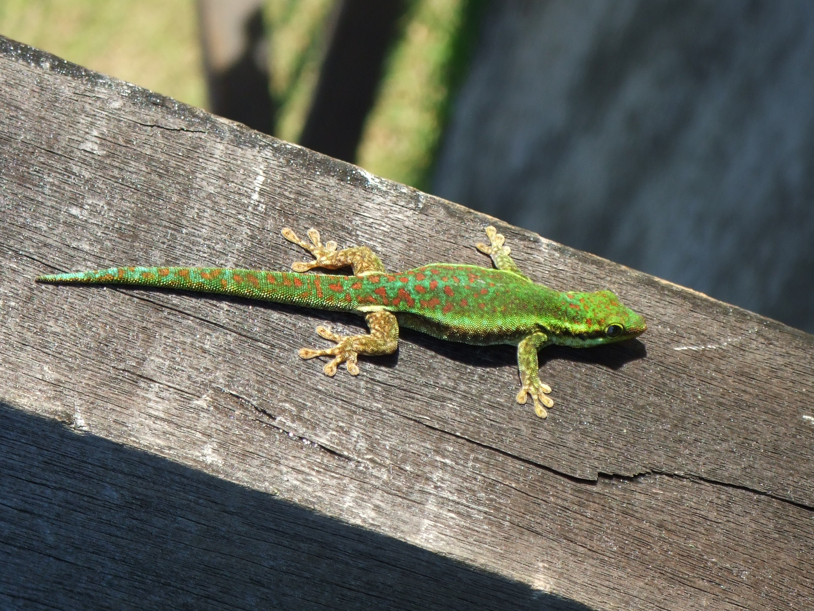 Gecko Vert des Hauts - Phelsuma borbonica - Photo prise au belvédère de l’Éden sur les hauteurs de la Rivière du Mât, Ile de la Réunion, Archipel des Mascareignes, Océan Indien